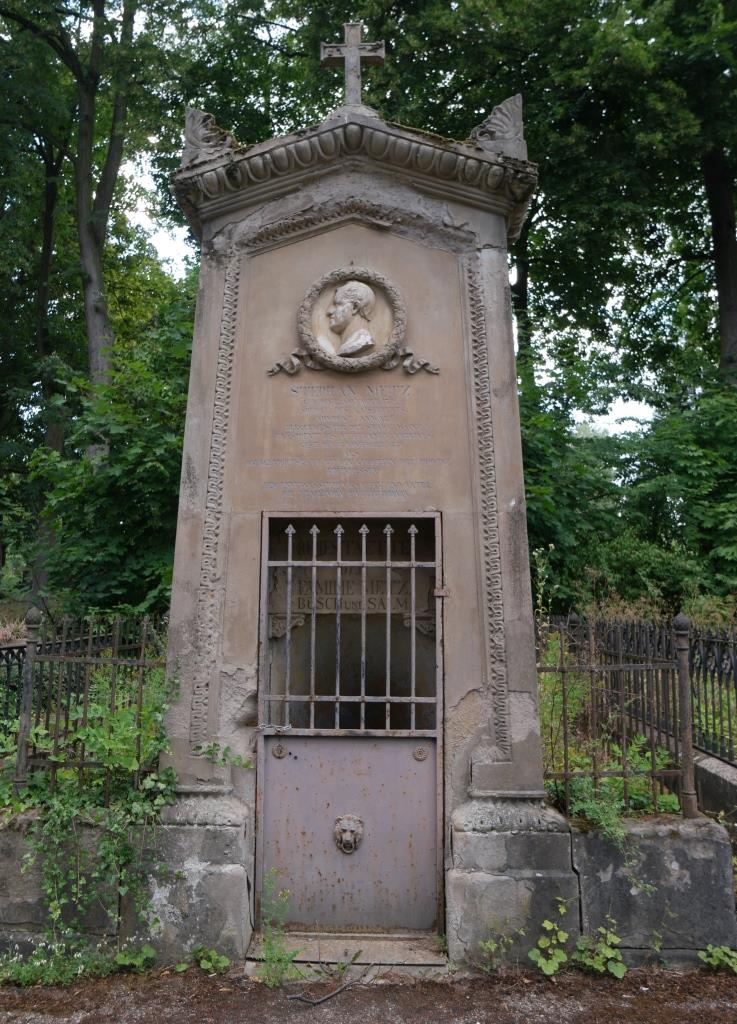 Grabmal des Rechtsanwalts und Mainzer Bürgermeisters Stephan Metz, 1789-1850, auf dem Hauptfriedhof Mainz